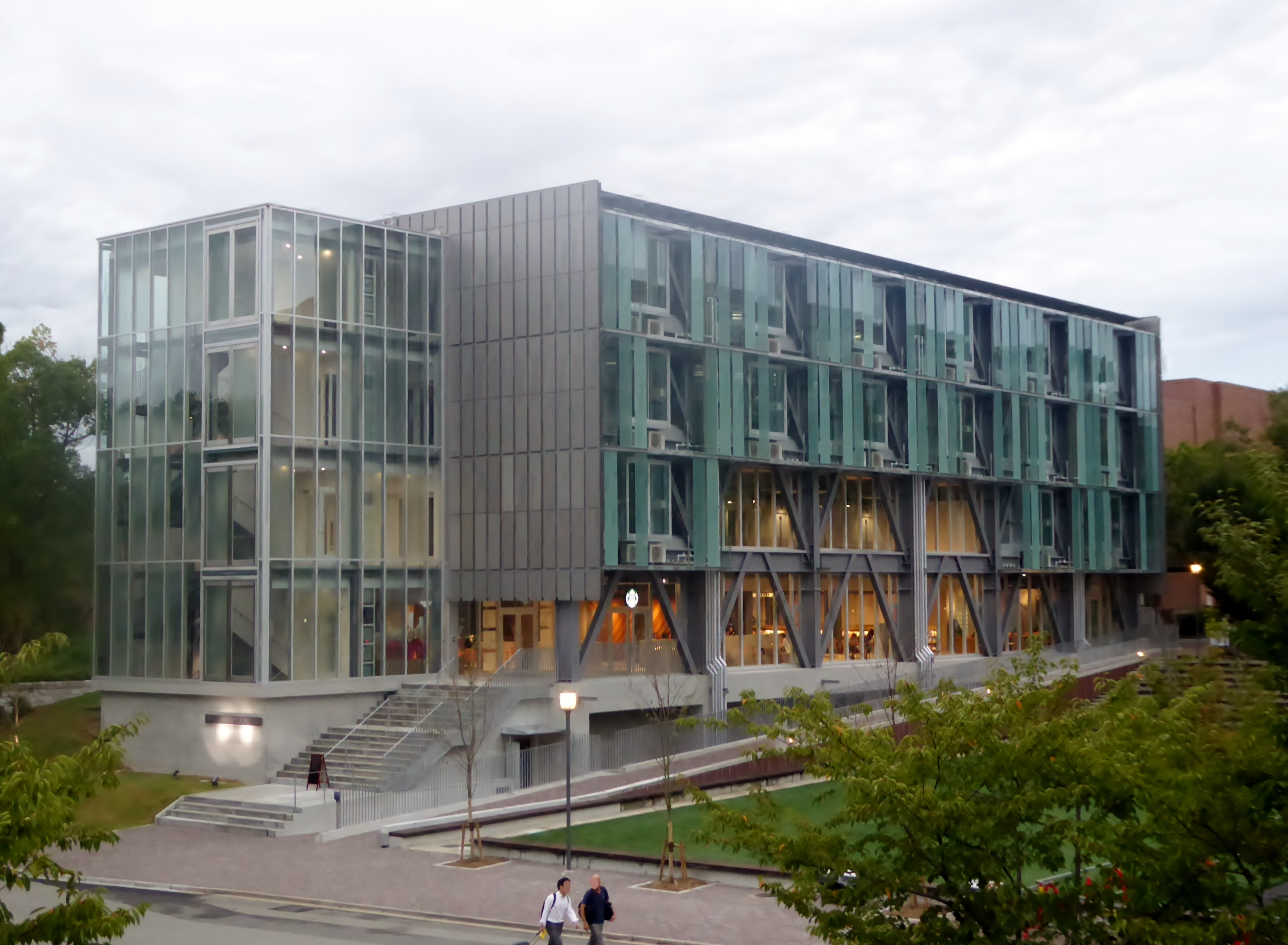 関西大学イノベーション創生センターを撮影。